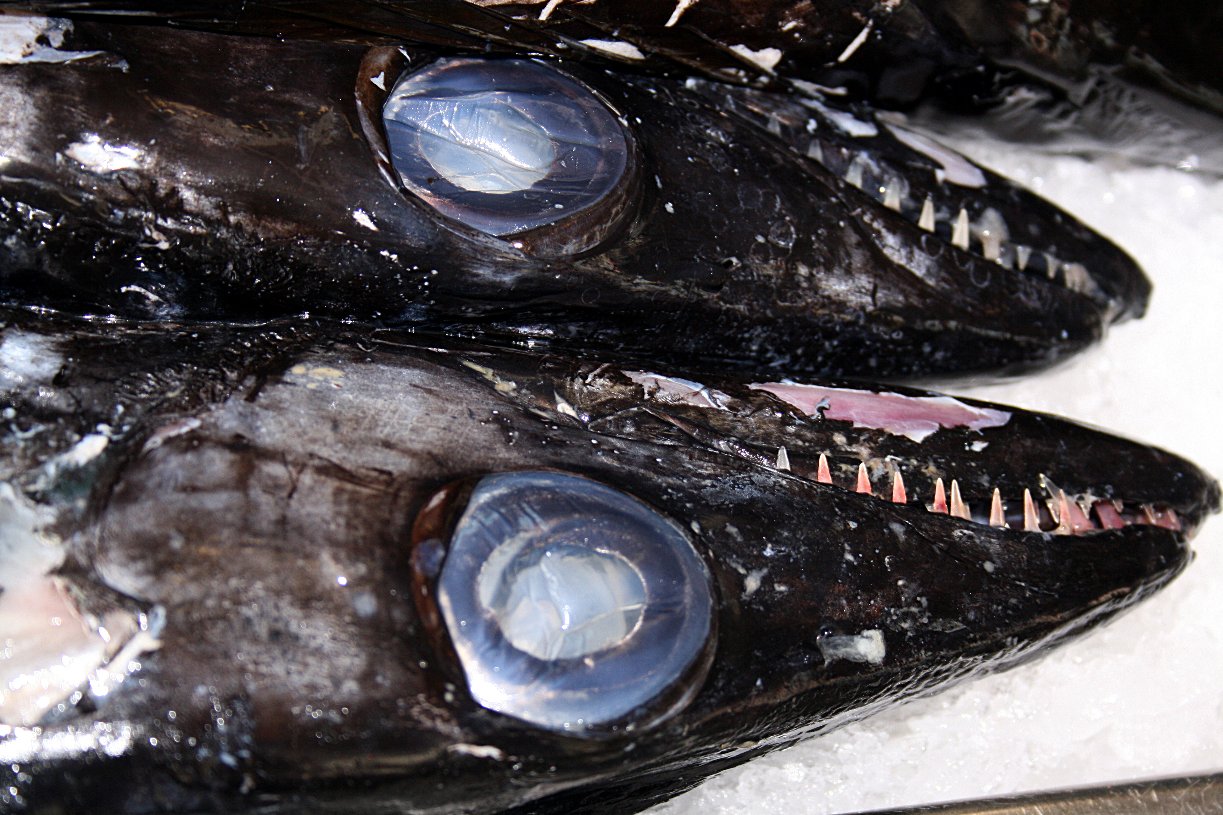 Madeira_schwarzer_degenfisch